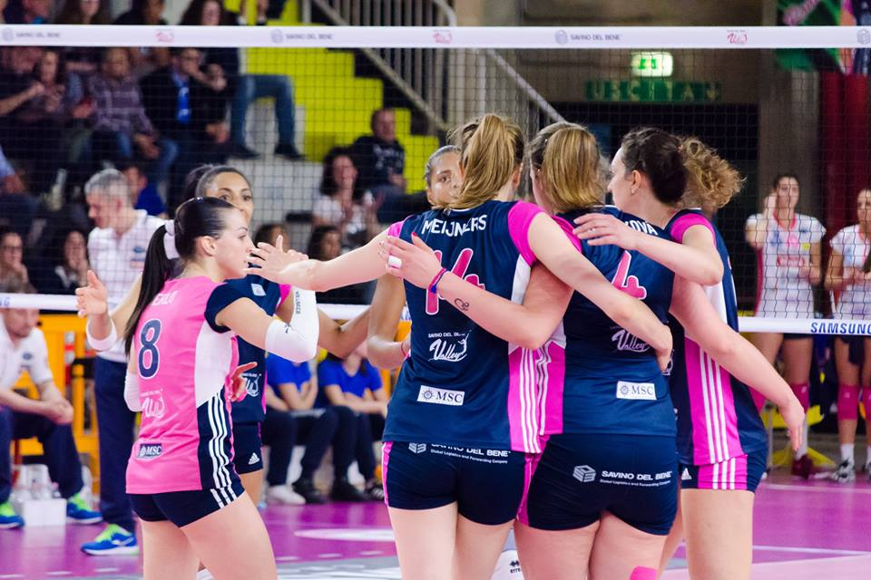 Vedi titolo